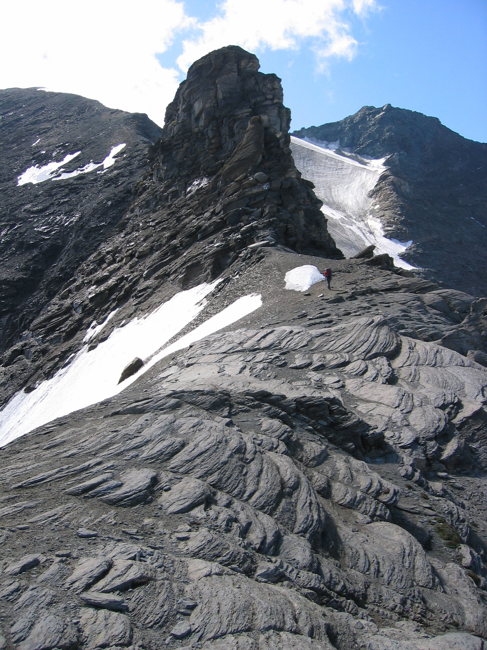 Kleiner Tenn